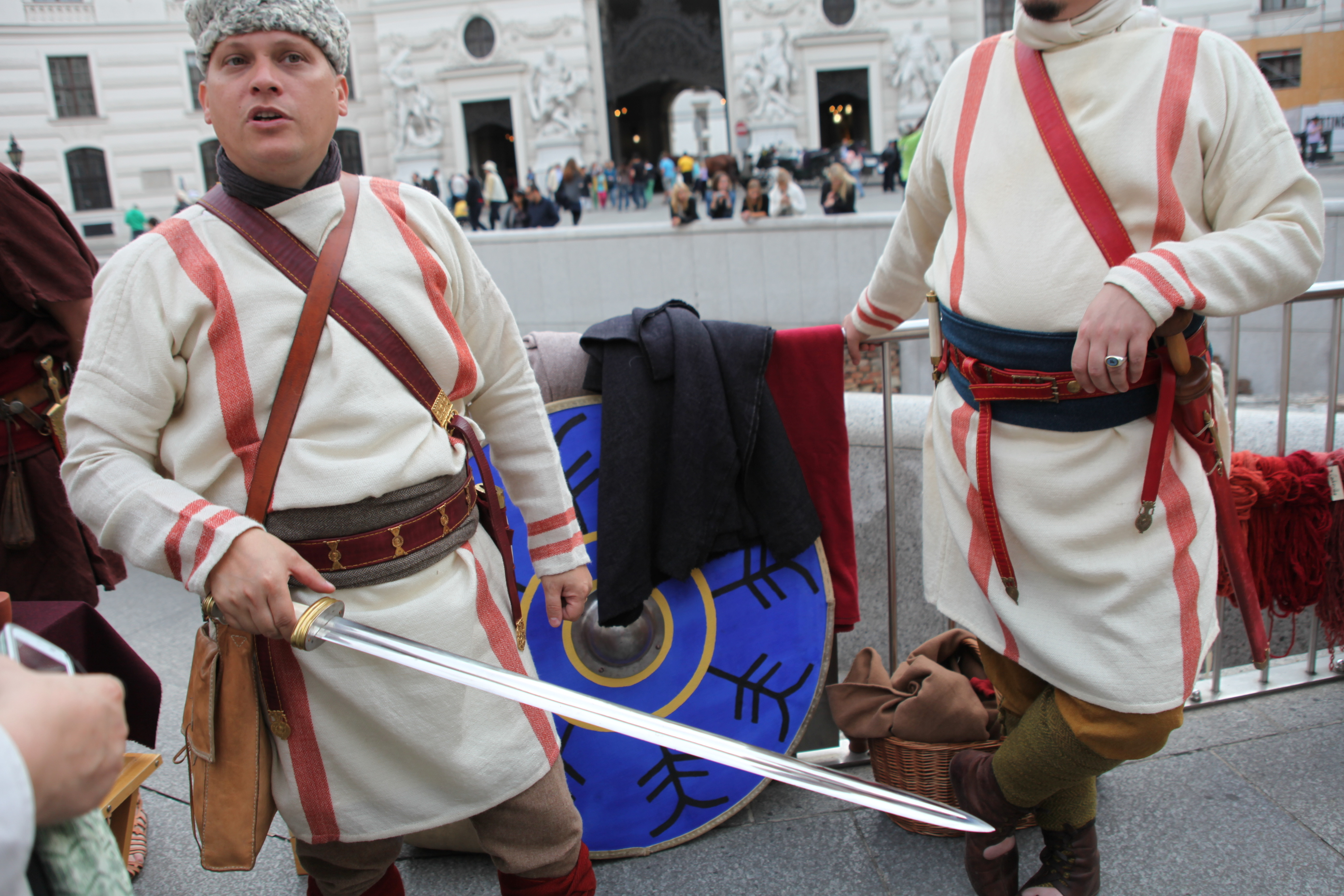 Michaelerplatz - Stadtarchäologie - Tag des Denkmals. Legionäre des 4. Jahrh. n. Chr. mit Langschwert und Hosen. Dieses Bild wurde anlässlich des österreichischen Tags des Denkmals 2012 in Wien eingereicht.